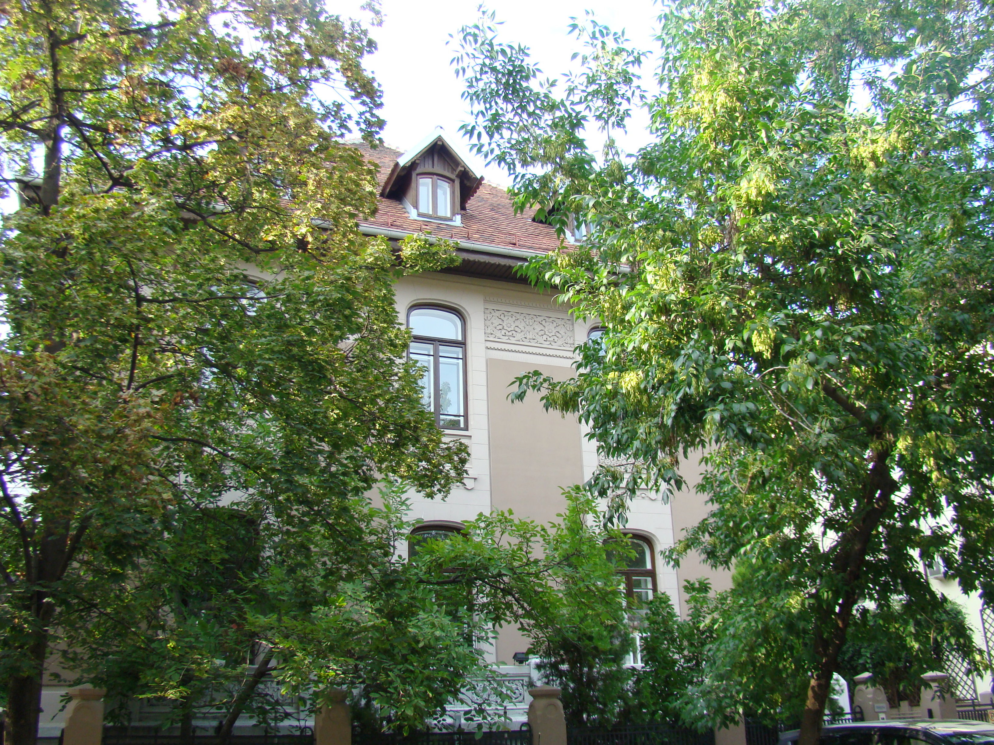 Casă monument istoric, str.Aleea Alexandru, nr.7